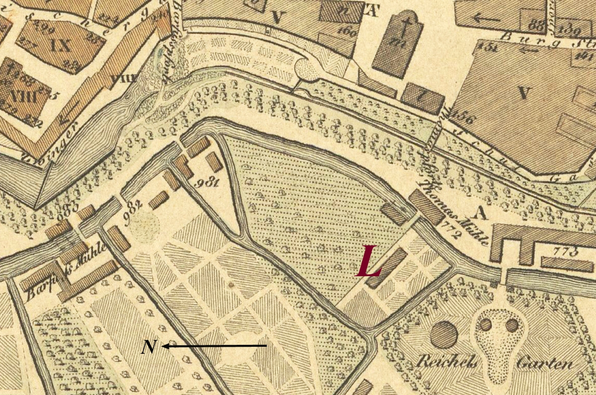 Lurgensteins Garten (L) auf einem Leipziger Stadtplanausschnitt westlich der Innenstadt von 1830